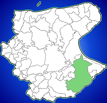 Mappa del territorio di Cerignola all'interno della Provincia di Foggia.